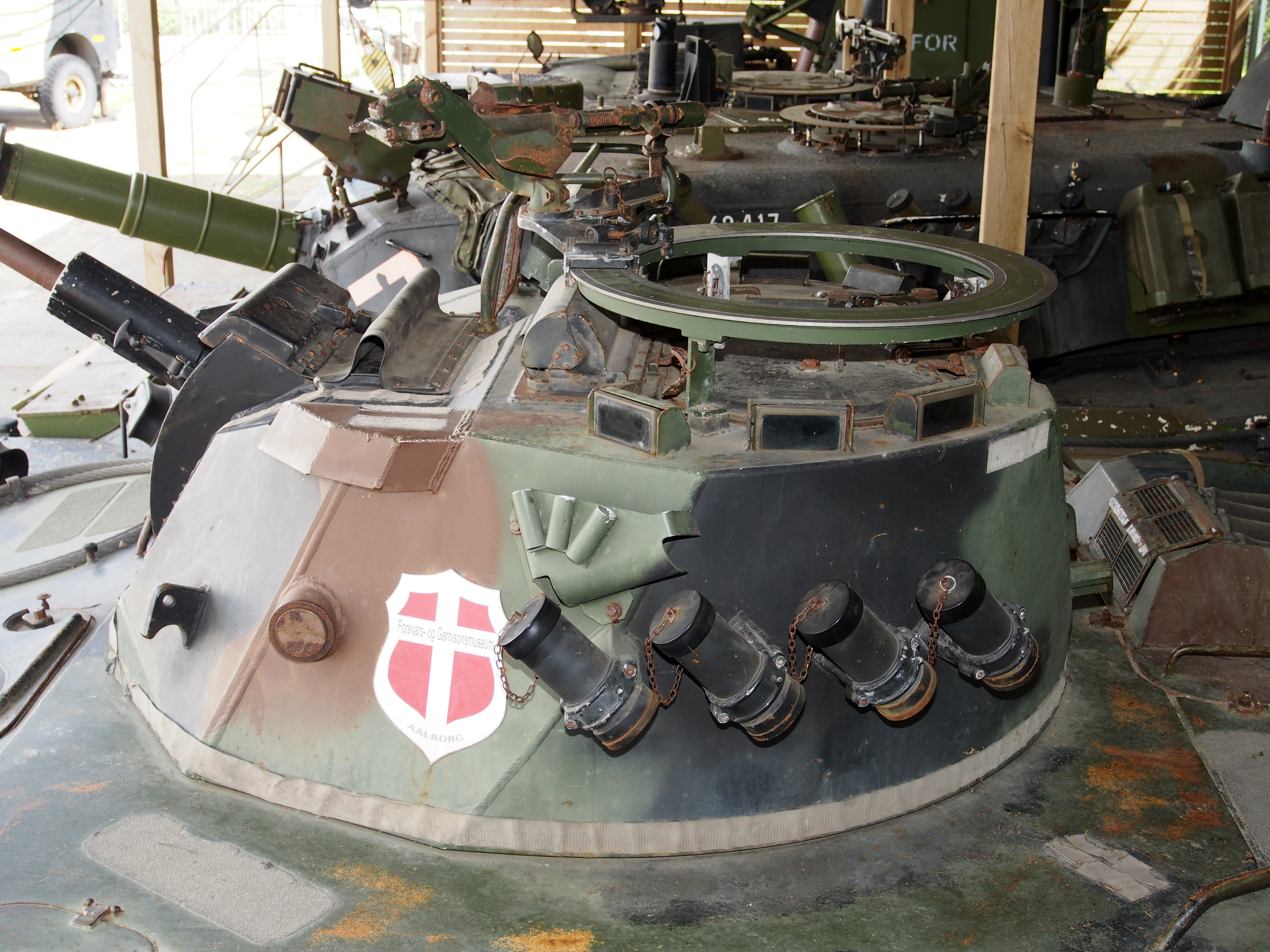 Photographed at Aalborg, Denmark.